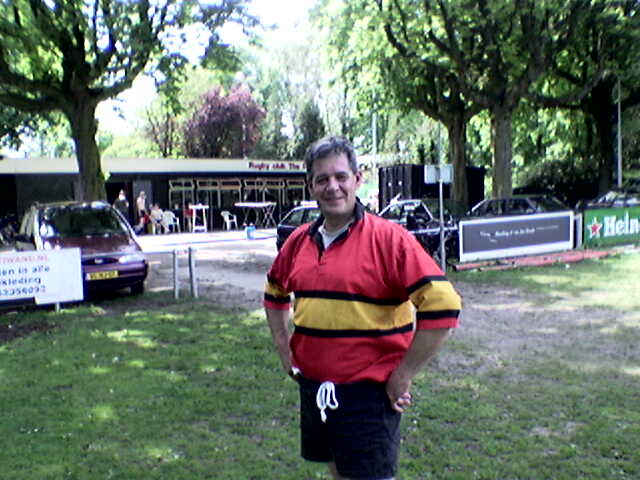 Afbeelding van het shirt van The Dukes genomen door de startauteur van artikel Dukes. Geen enkel auteursrecht van toepassing.